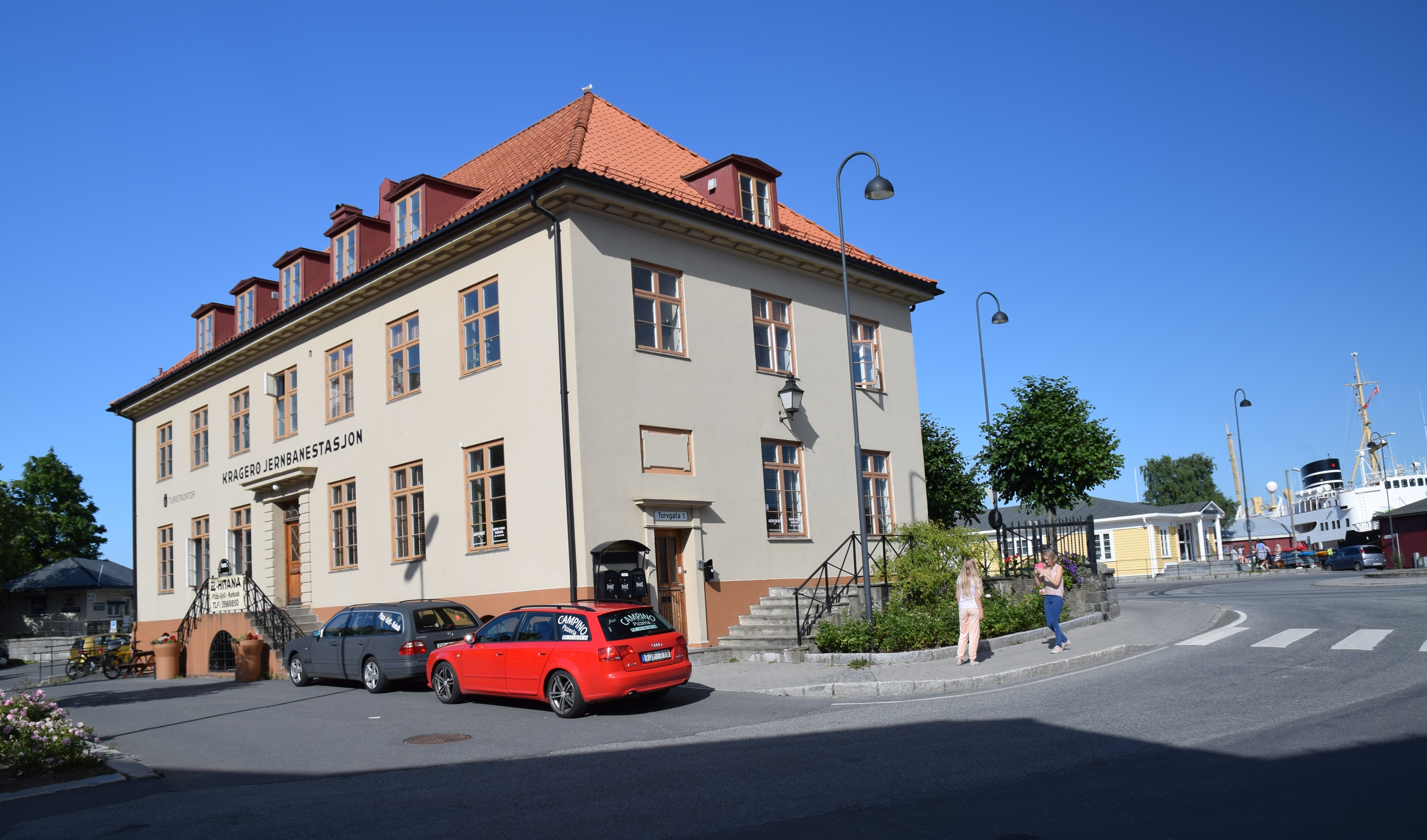 Kragerø jernbanestasjon. I 2014 holder turistkontoret til her.